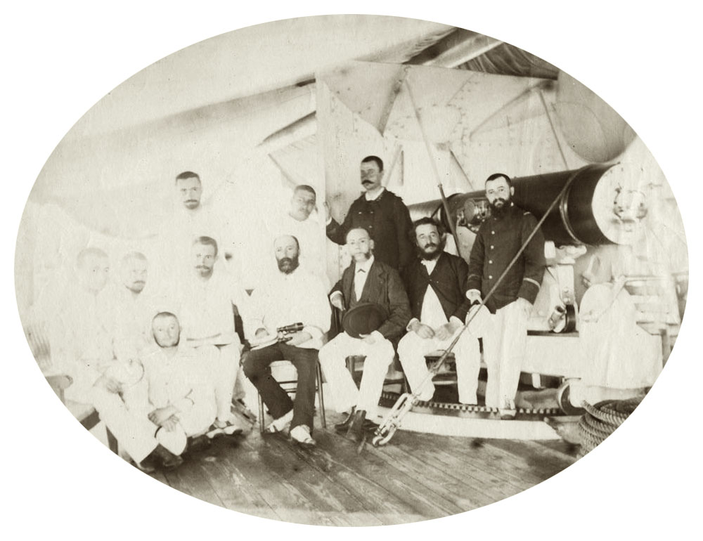 A bord de la Dives: Image fixe ; 30/03/89.